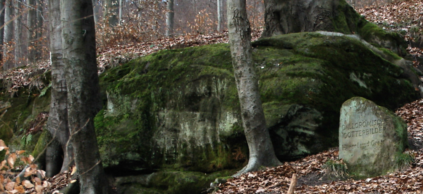 Gallorömisches Figurenrelief aus dem dritten Jahrhundert nach Christus. Im Volksmund "Hänsel und Gretel", "Die Engelchen" oder "Herr Rapp und seine Frau" genannt. Es handelt sich vermutlich um Segensgottheiten aus dem keltoromanischen Götterkreis.